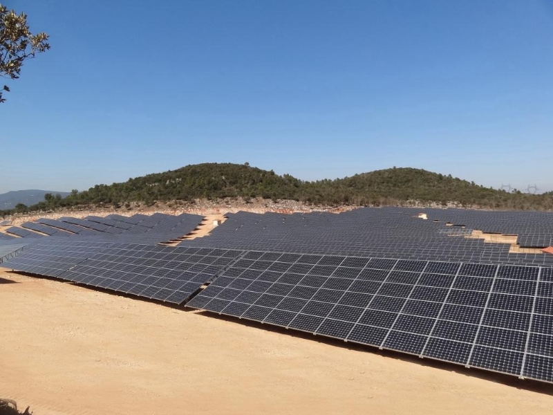 Solarpark Néoules, Département VAR, Frankreich (23,92 MWp) Referenzprojekt Phoenix Solar AG, Sulzemoos.